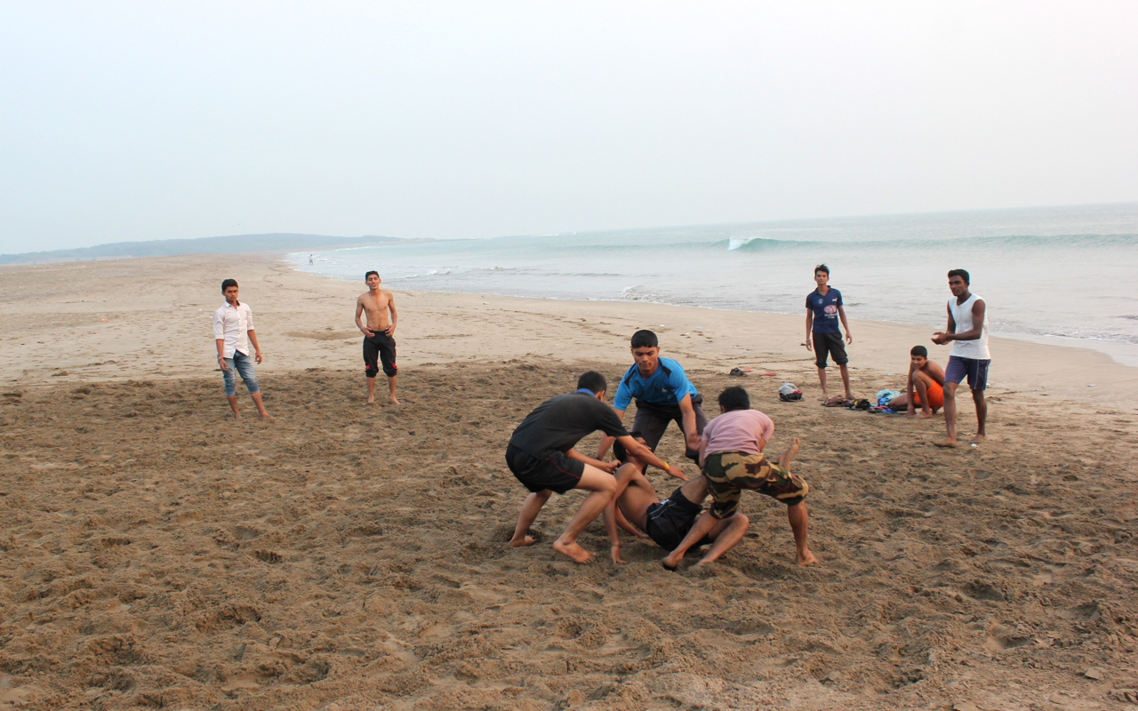 Somnath/Veraval beach, Gujarat. Jan '15. Veraval